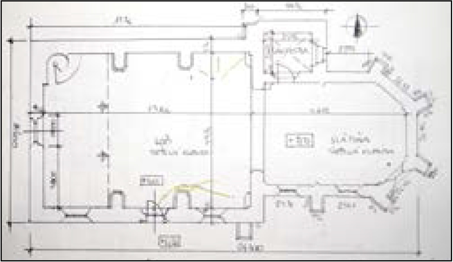 Pôdorys